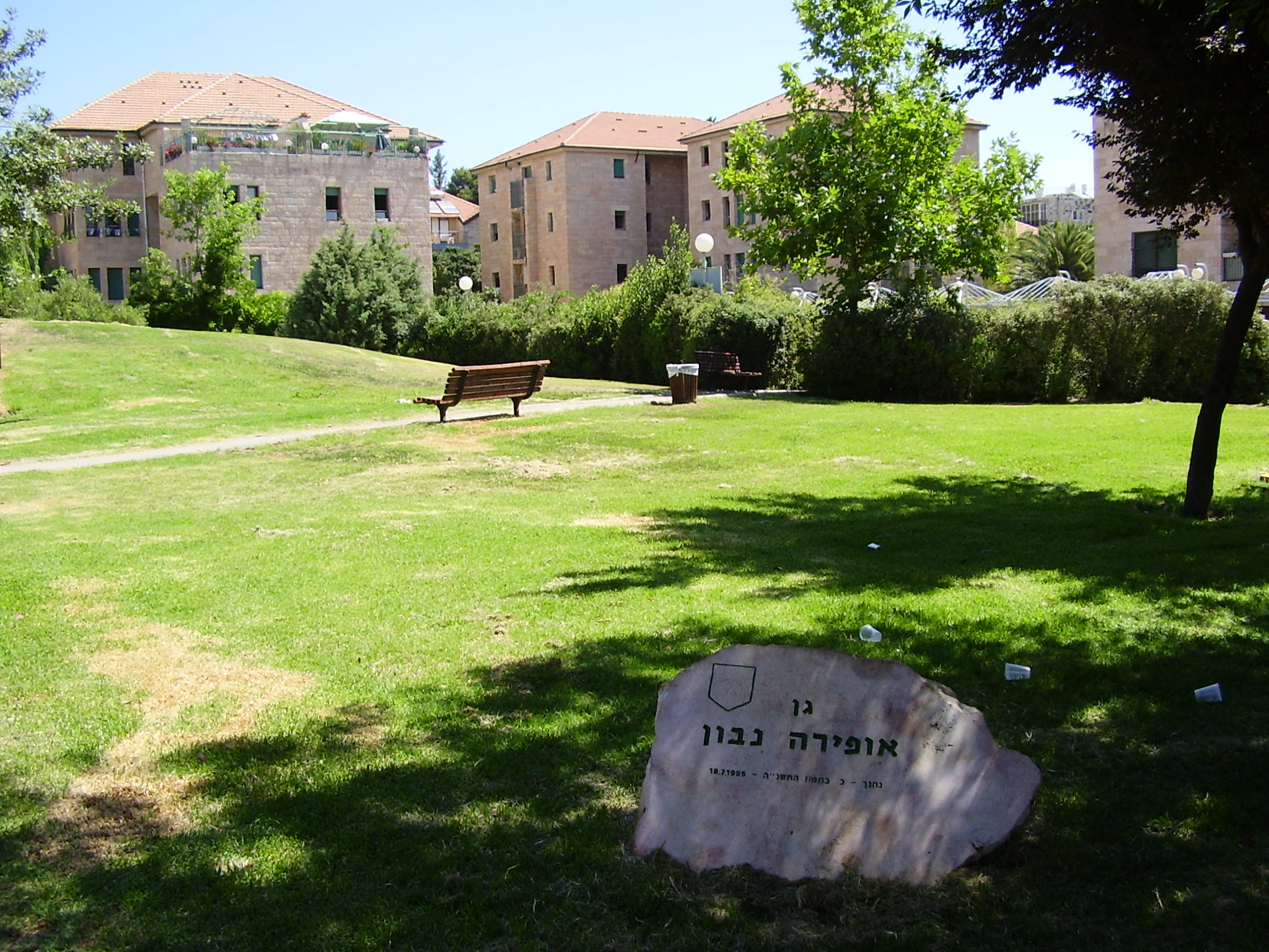 ofira navon garden, jerusalem